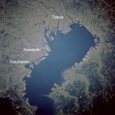 Satellietopname van de baai van Tokyo